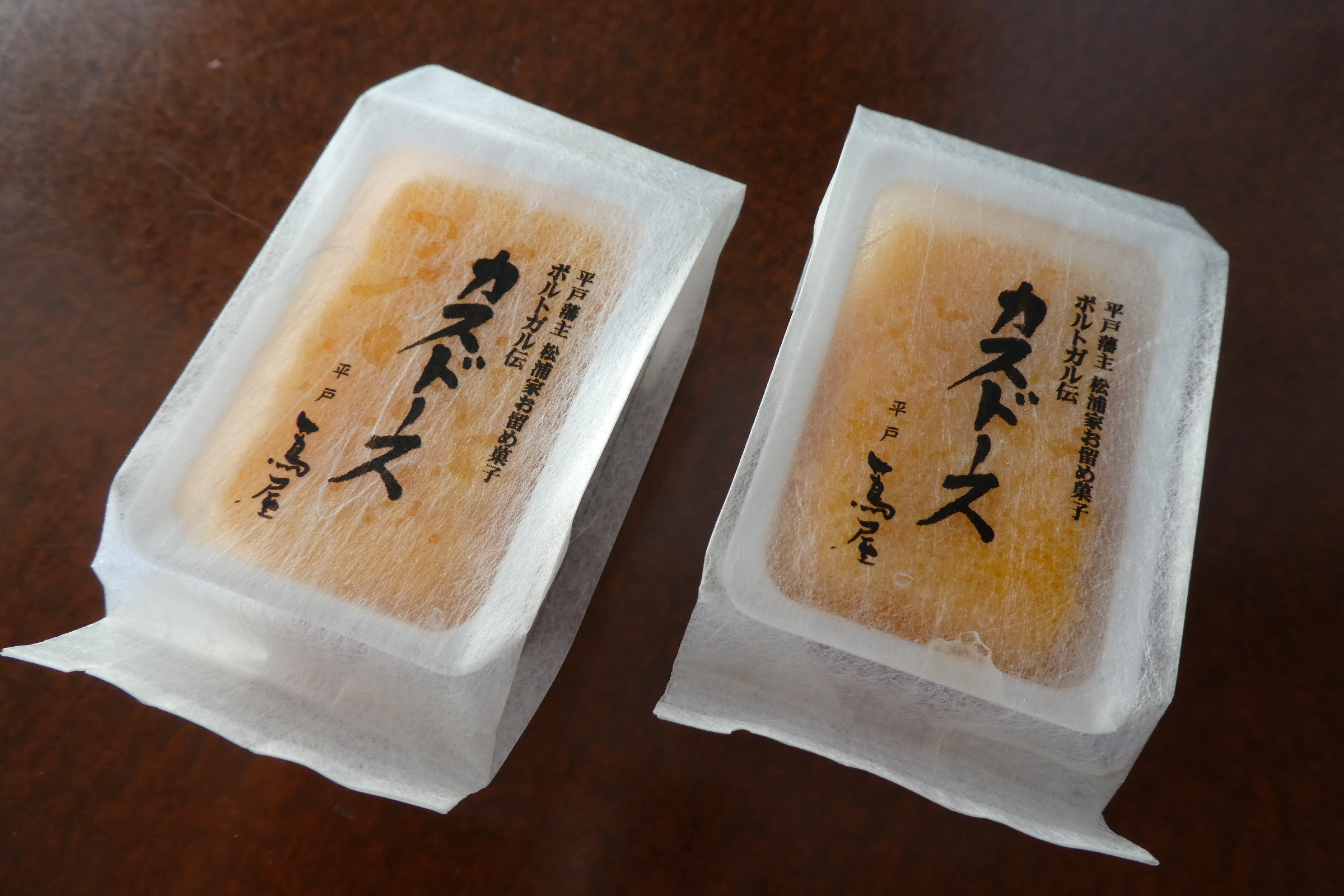 つたや總本家（平戸蔦屋）のカスドース